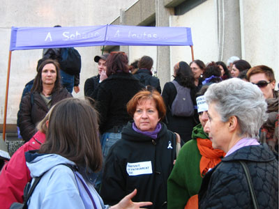 Représentant plusieurs associations, le collectif Solidarité féministe s’est constitué à l’occasion du procès de Djamel Derrar, pour rappeler que le meurtre de Sohane Benziane est un crime sexiste, qui aurait pu avoir lieu dans tout autre milieu social ou culturel.